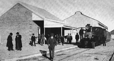 La estación Gaiman en funcionamiento hacia 1920